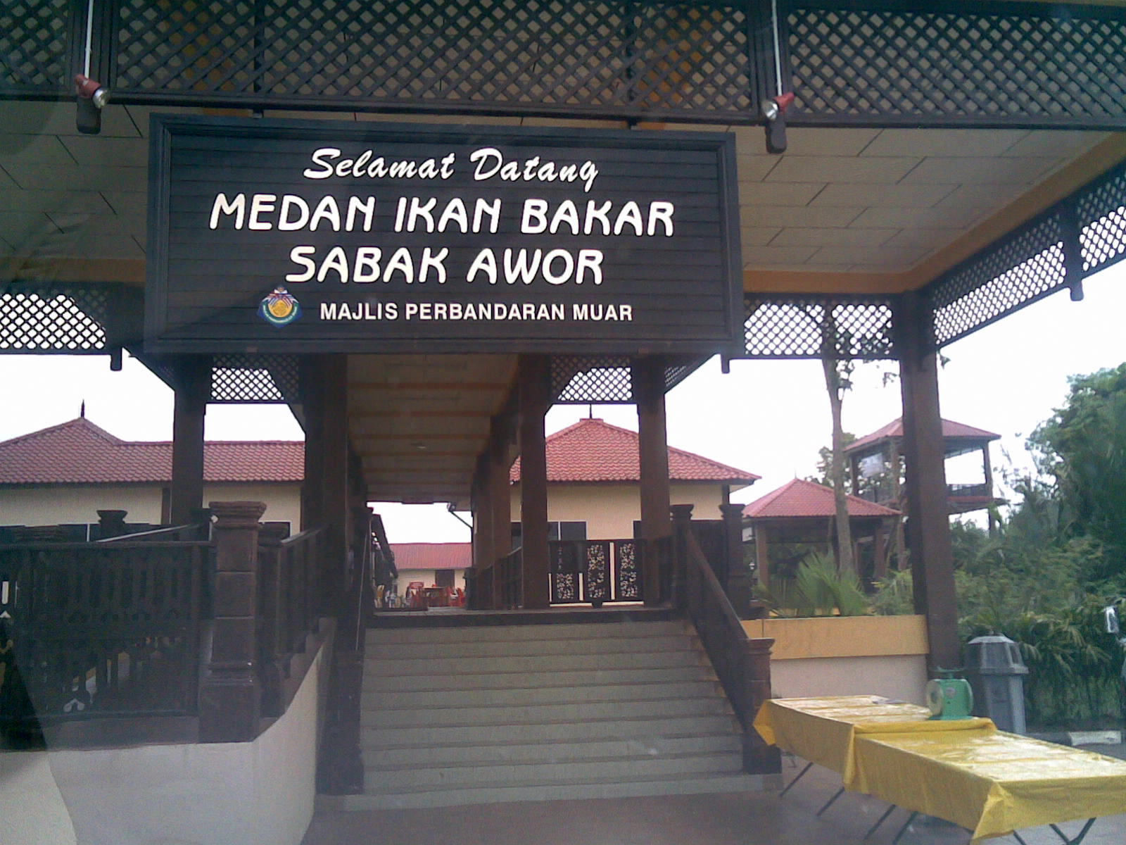 Medan Ikan Bakar Sabak Awor